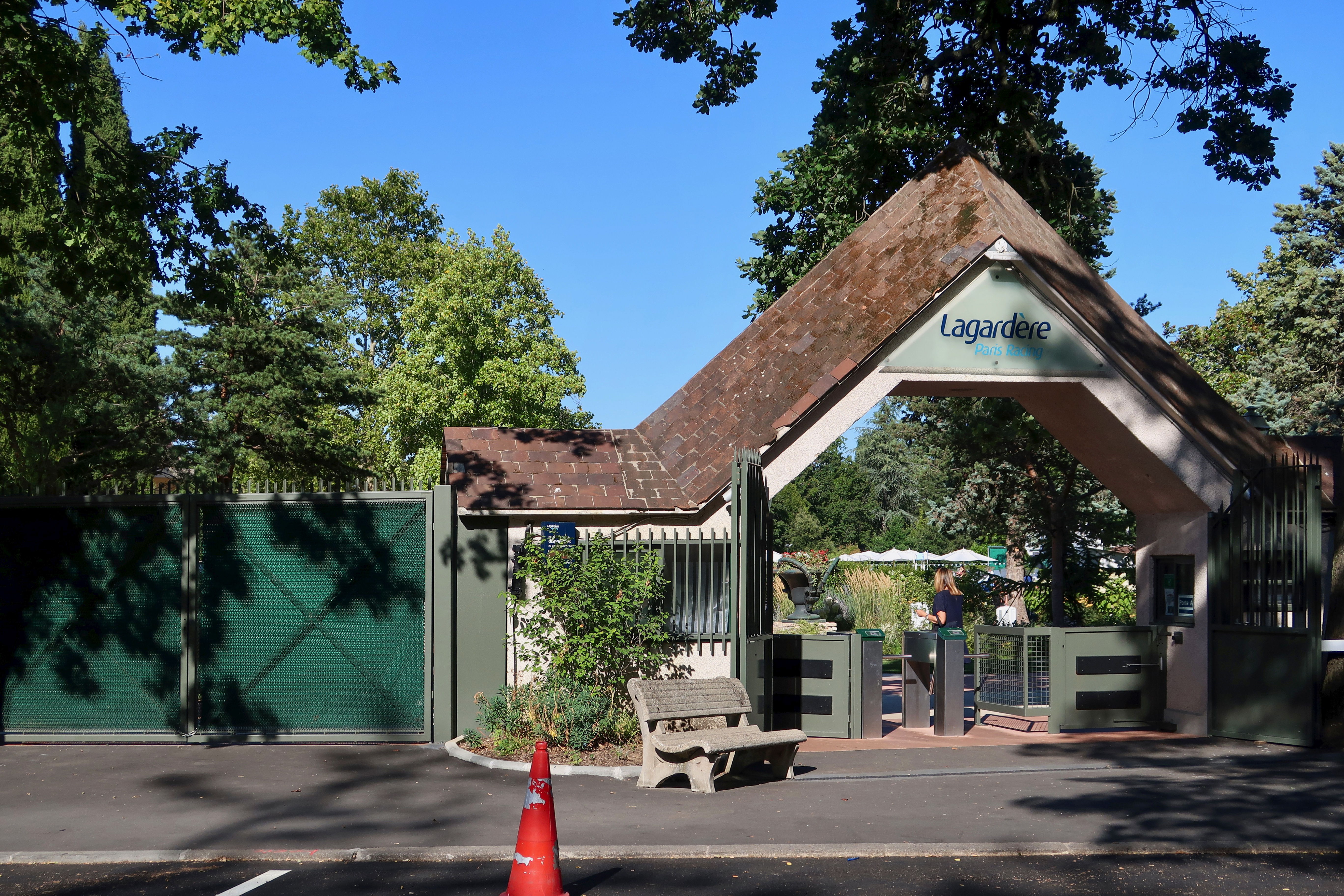 Lagardère Paris Racing dans le bois de Boulogne (Paris, 16e).